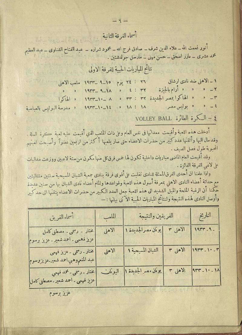 ahly volleyball history book from 1933